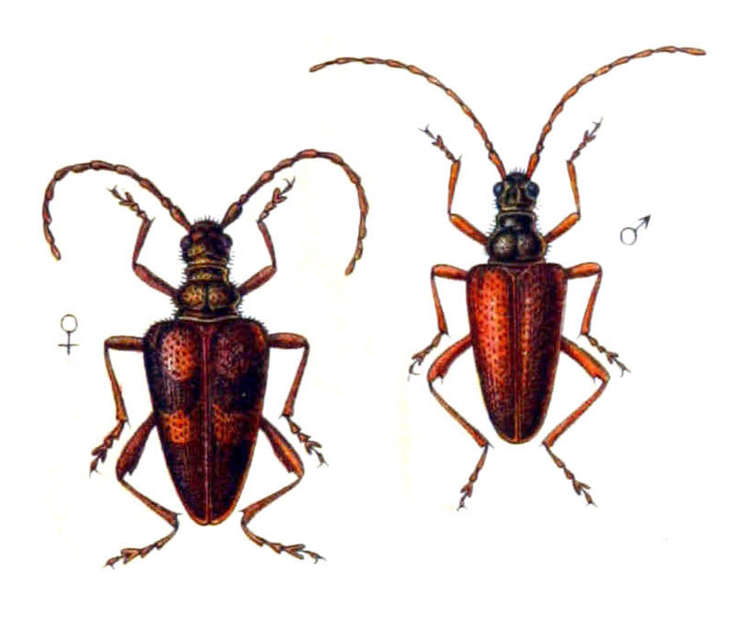 Acimerus schäfferi Laich. = Akimerus schaefferi (Laicharting, 1784) (left : adult male, dorsal view, right : adult female, dorsal view)